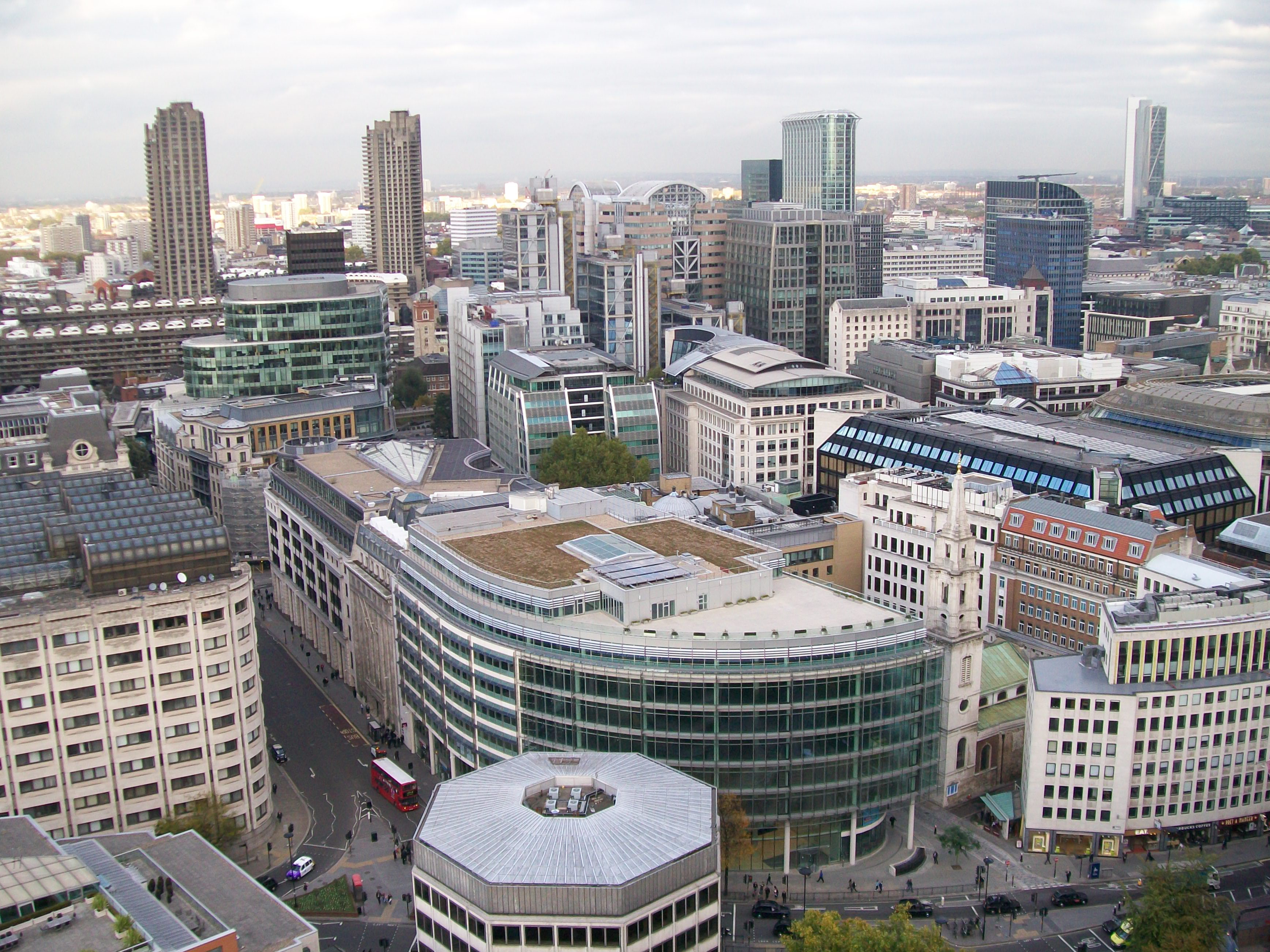 Pohľad z Katedrály sv. Pavla na Londýn